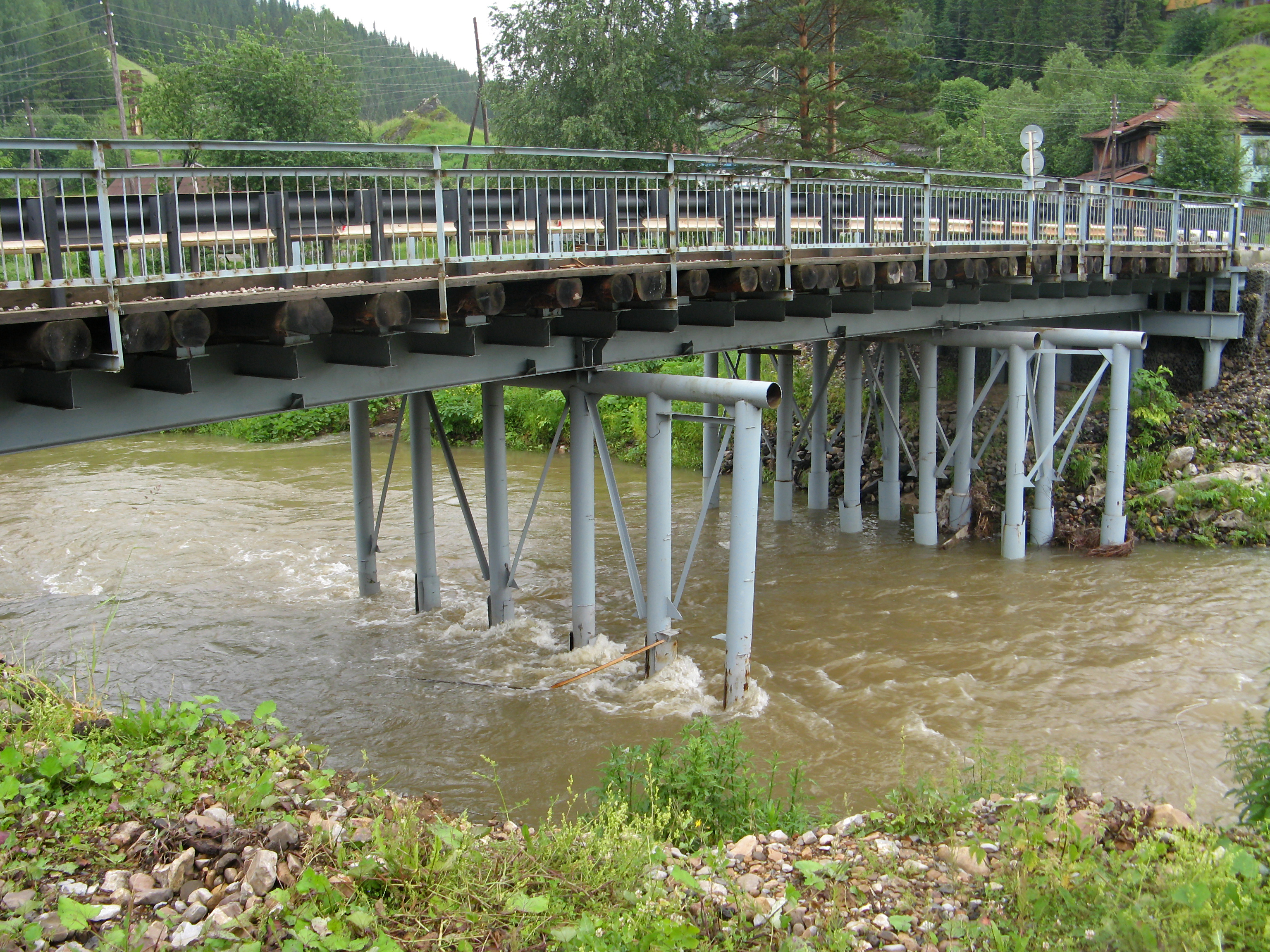 Кын. Мост через реку Кын